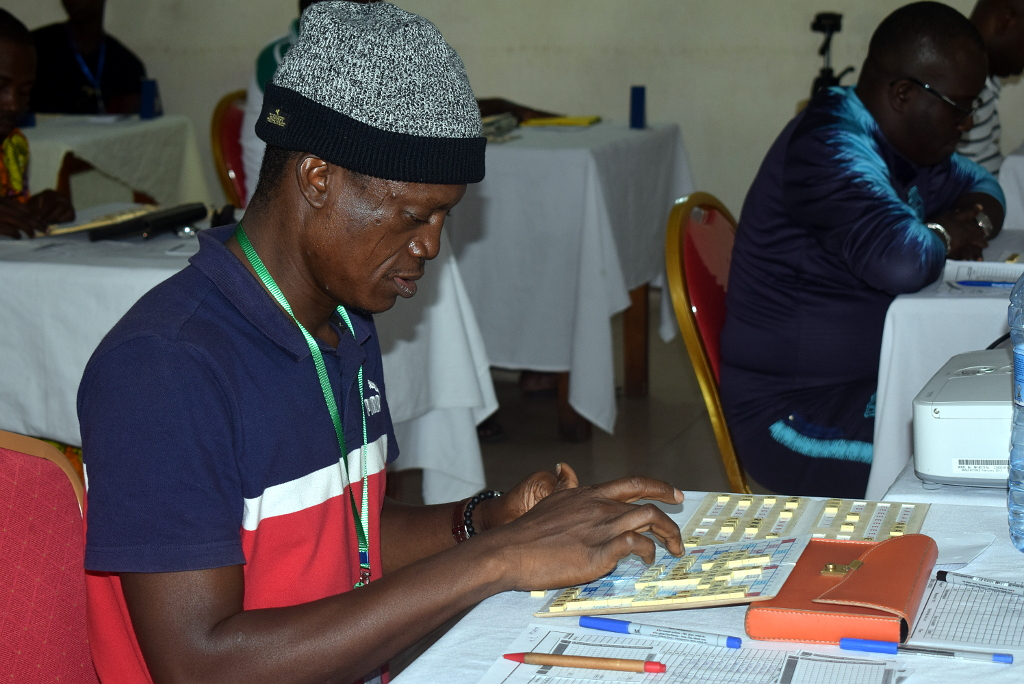 Benin, Championnats nationaux de scrabble 2019, Epreuve Elite; l'international Adjovi Francois Xavier face à sa table This is an image with the theme "Play" from: Benin